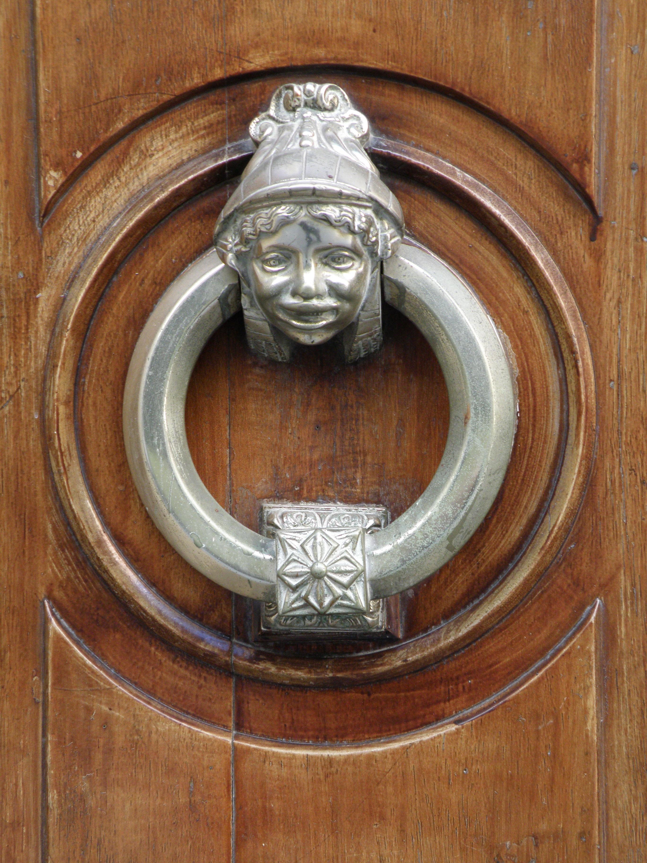 Casa Guardiola-Boule a Reus, Baix Camp. Picaporta.